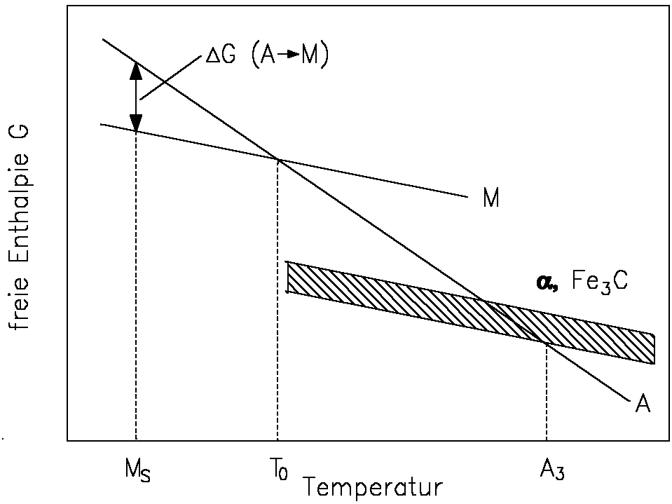 Einfluss der Temperatur auf die freie Enthalpie G von Austenit A, Ferrit α und Eisen­kar­bid Fe3C sowie Martensit M (schema­tisch)